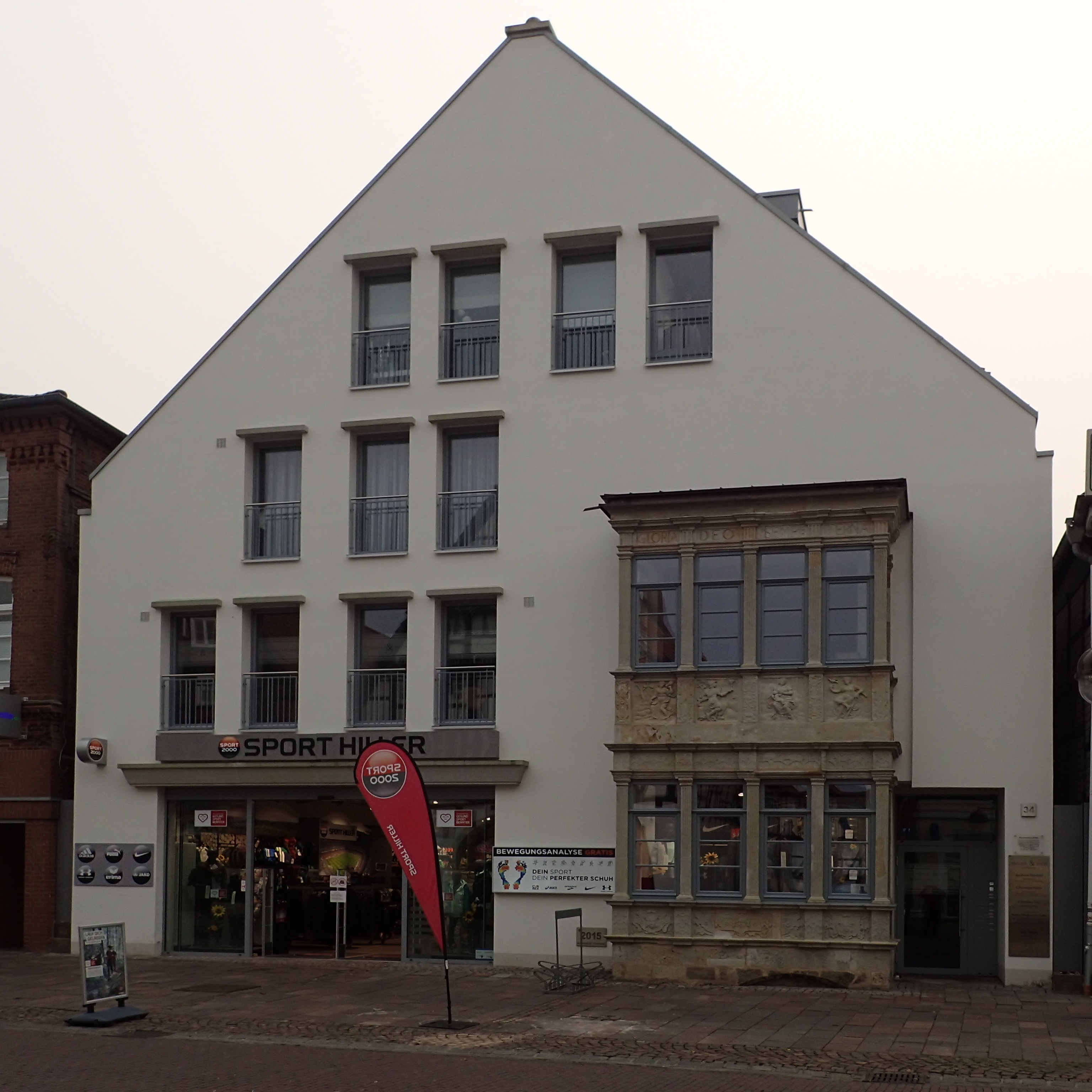 Stolpersteinlage Nienburg Lange Straße 34